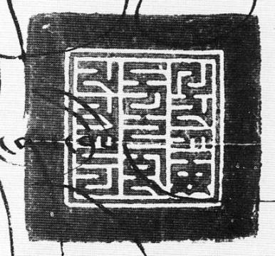 Amtssiegel der Throninhaber von Sakya